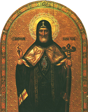 Icon